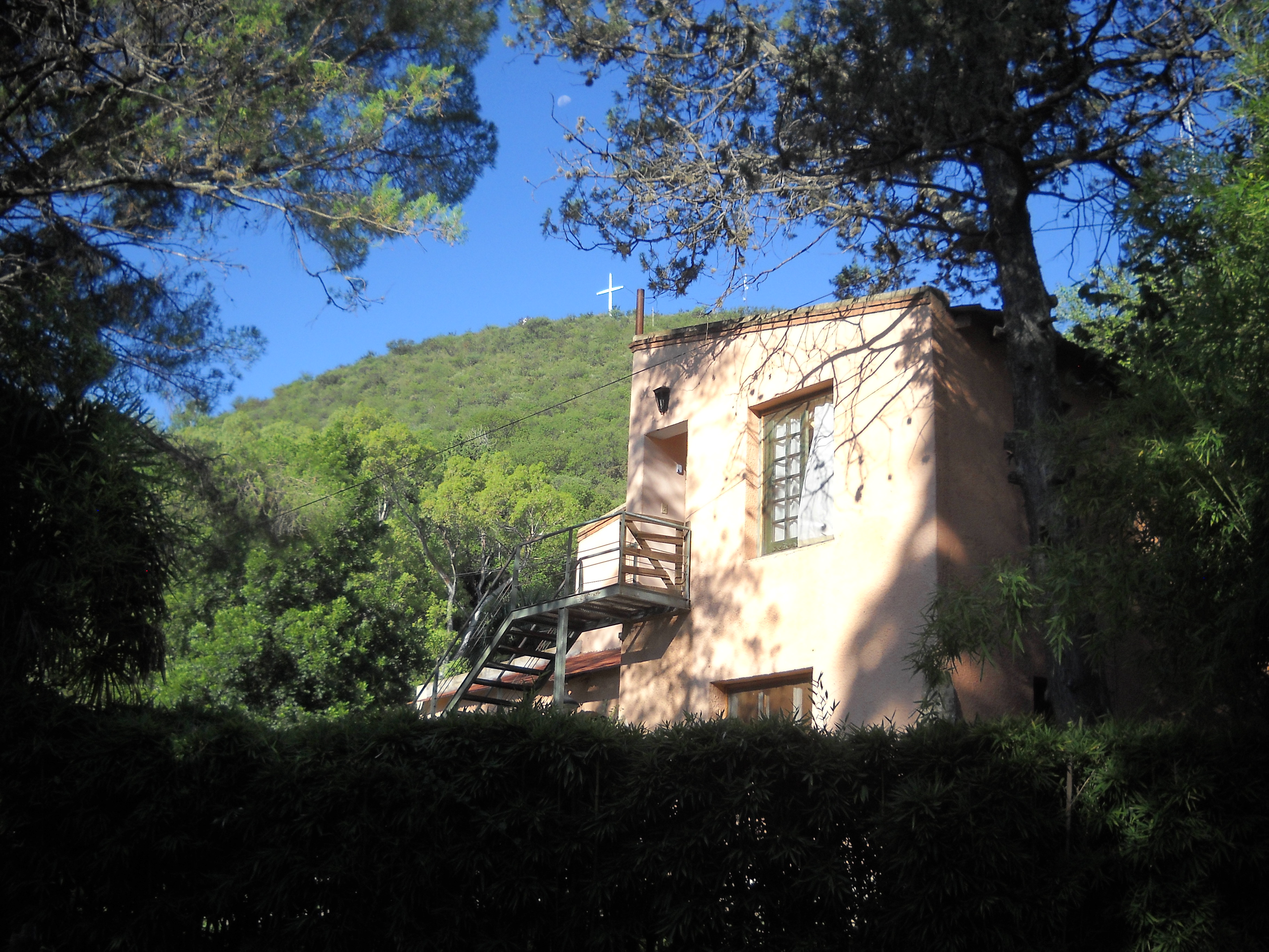 Vista del Cerro Loma Bola con la Cruz en su cima.